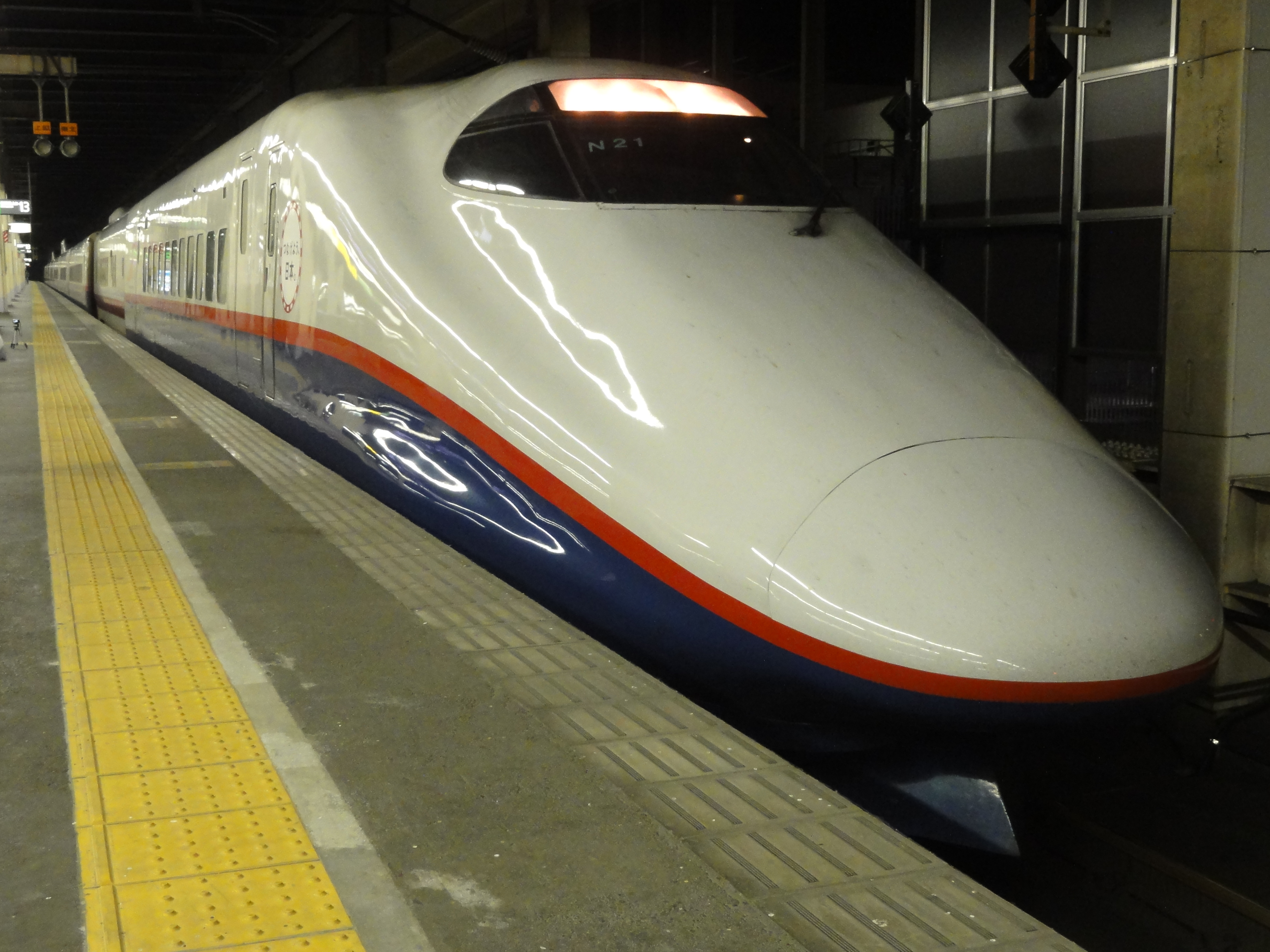 新幹線E2系（長野新幹線用）